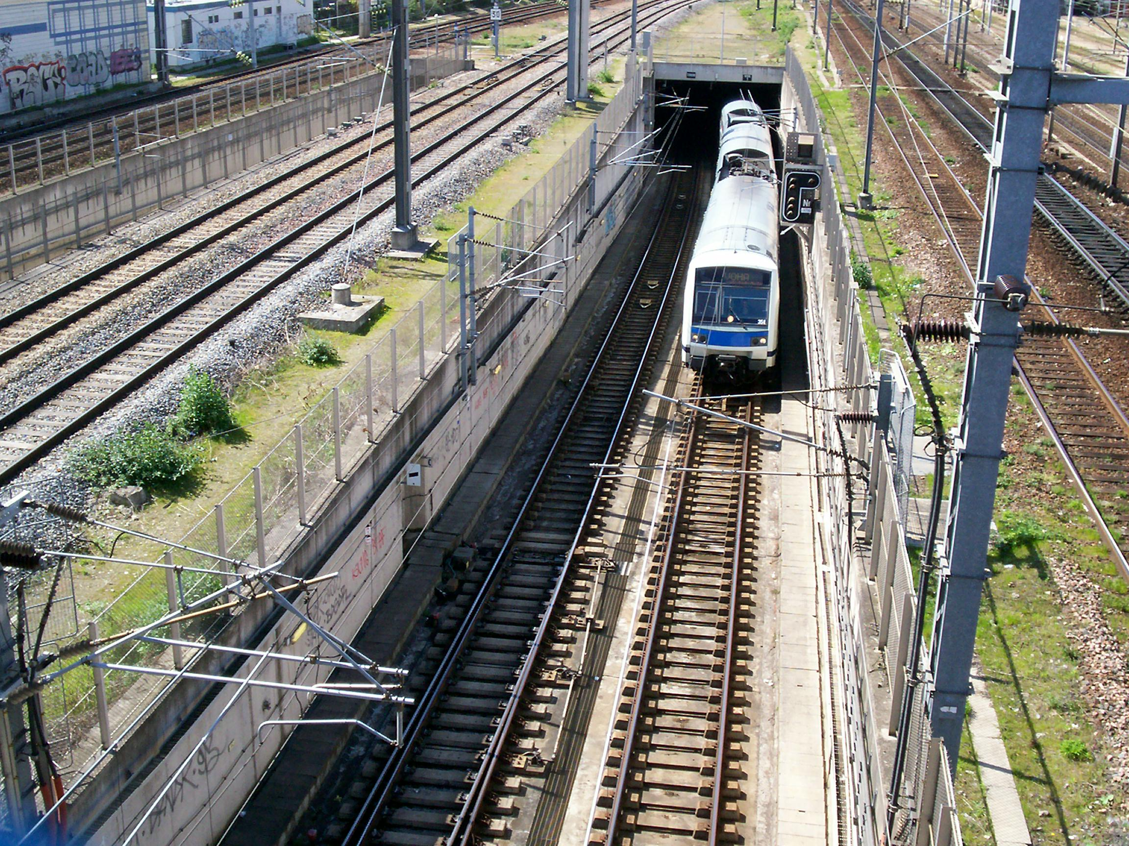 Vue depuis le pont de la rue Riquet d'un train VOHA sortant du tunnel EOLE